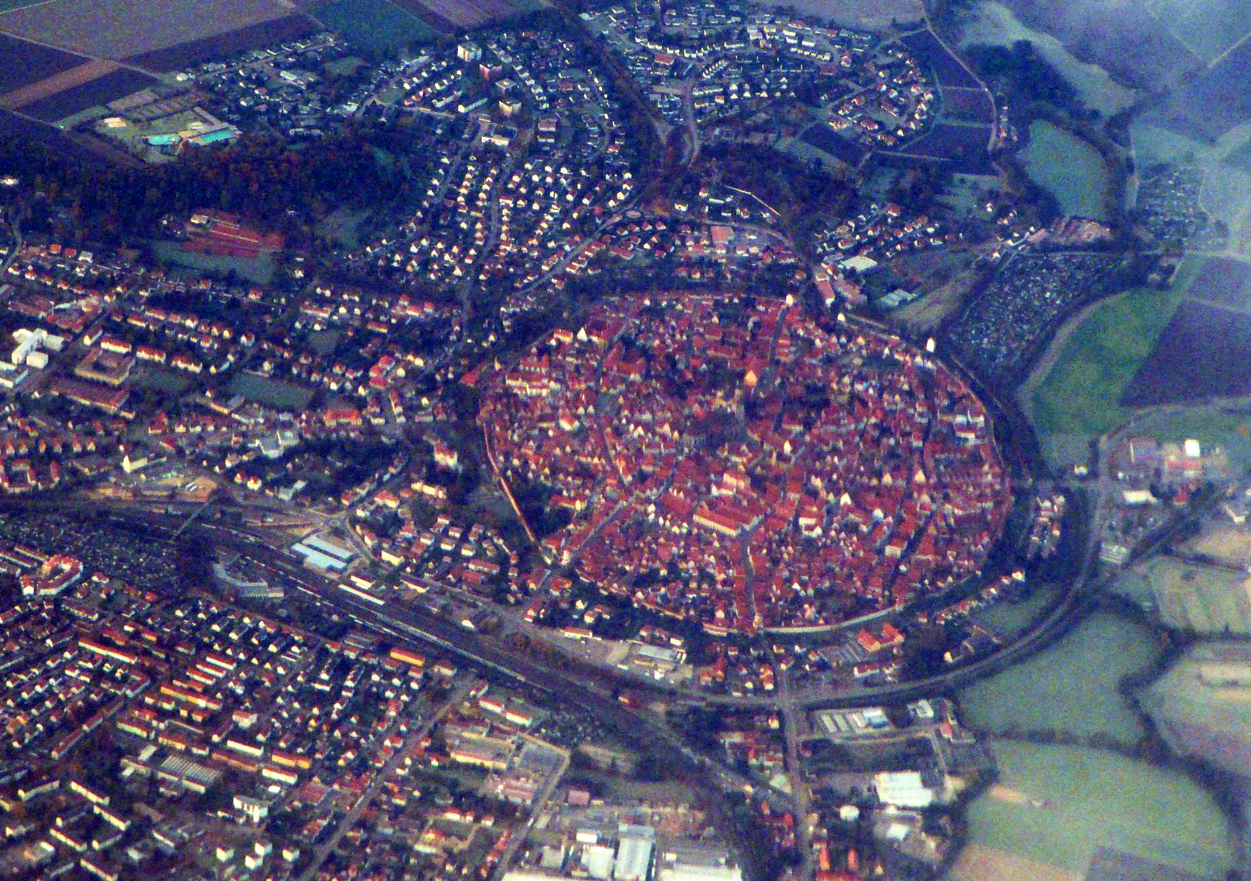 Luftaufnahme von Nördlingen aus nordöstlicher Richtung.